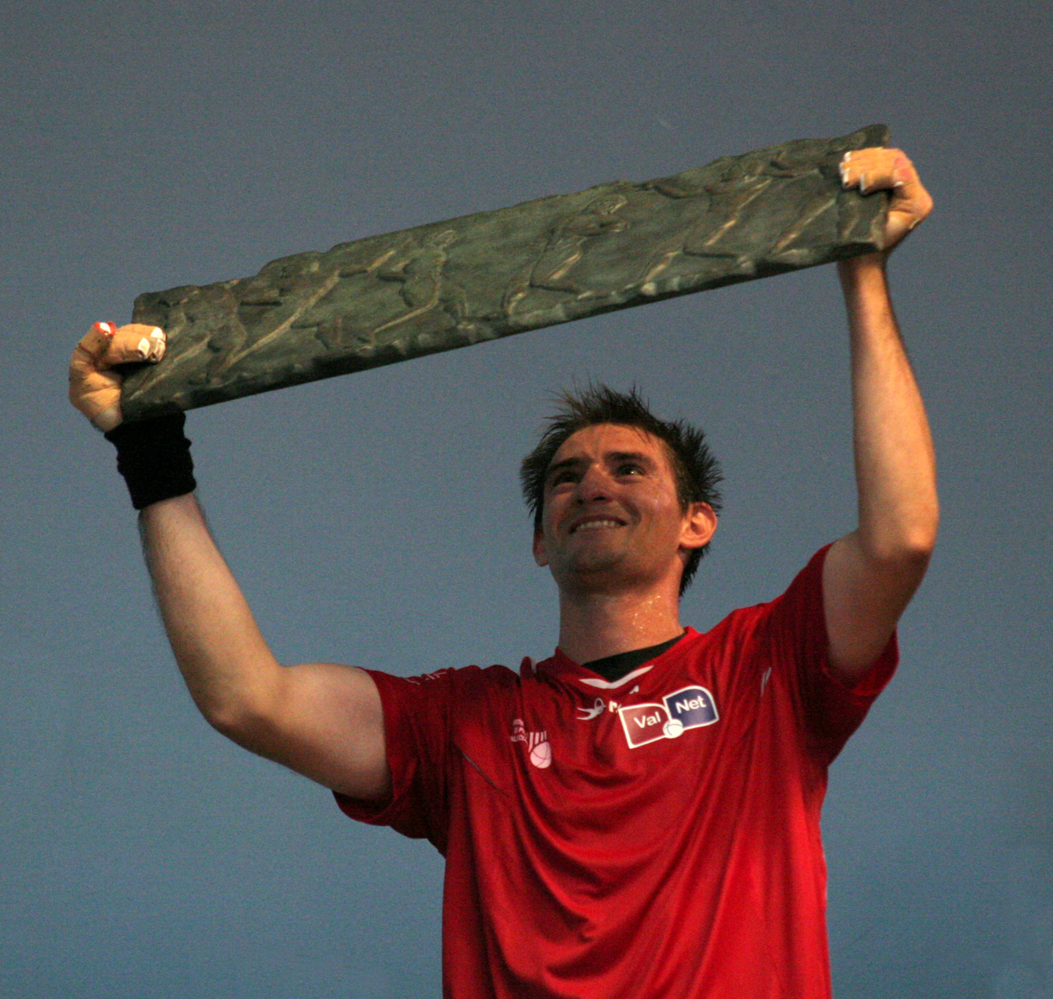 Soro III alça el Fris Grec aconseguit al Trofeu Individual d'Escala i Corda de 2014